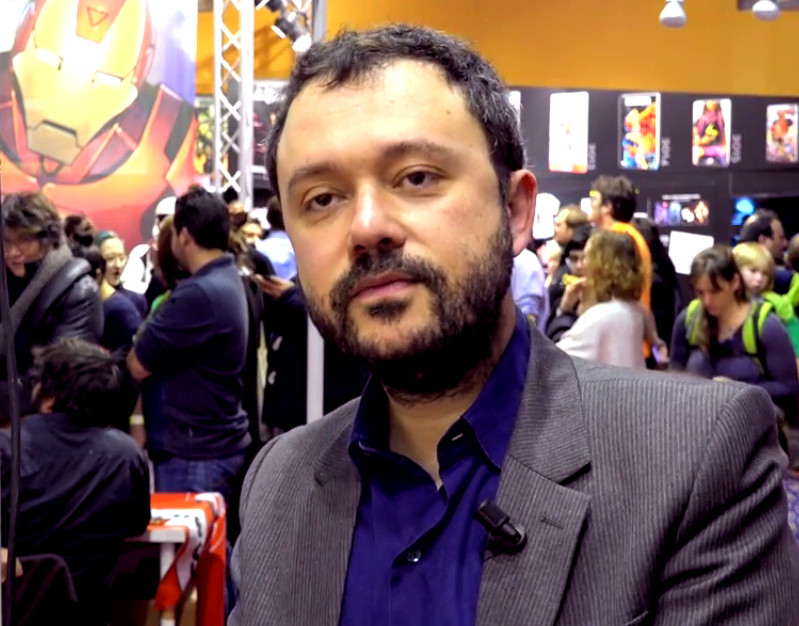 Riad Sattouf à Angoulême en 2017